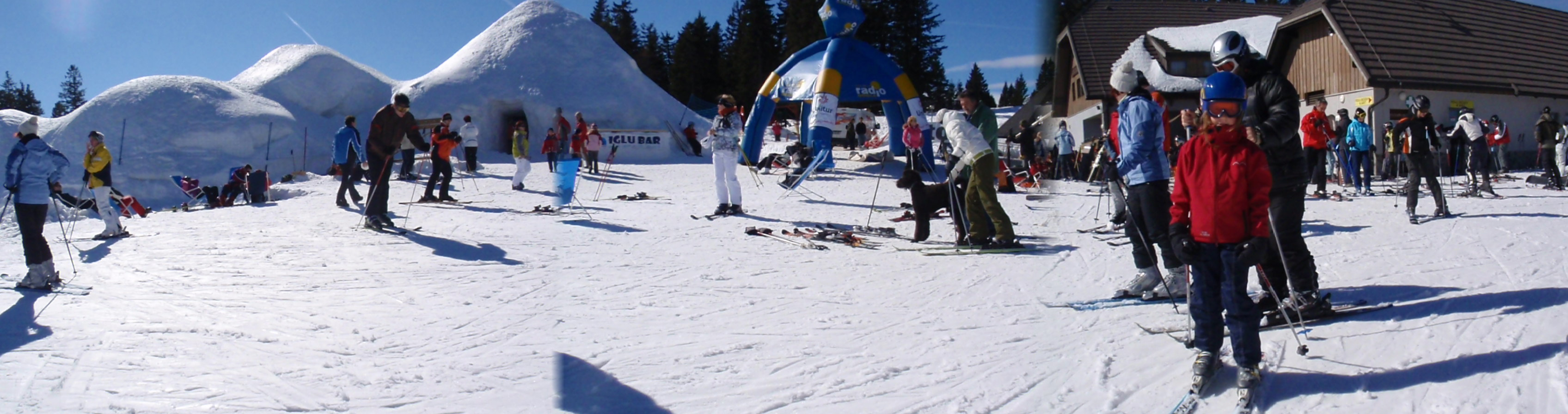 Rogla- Eskim village